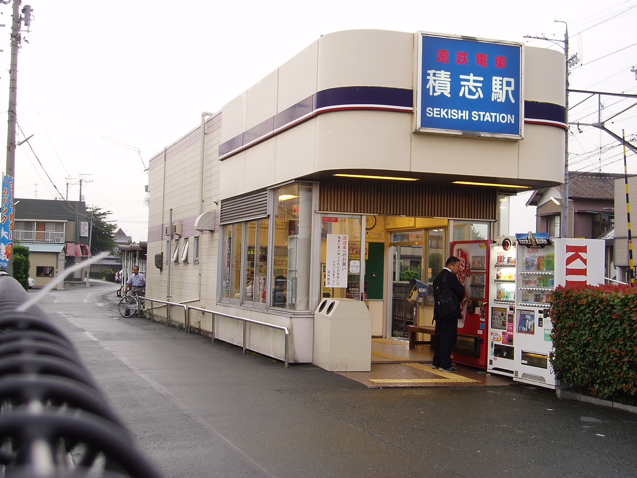 積志駅